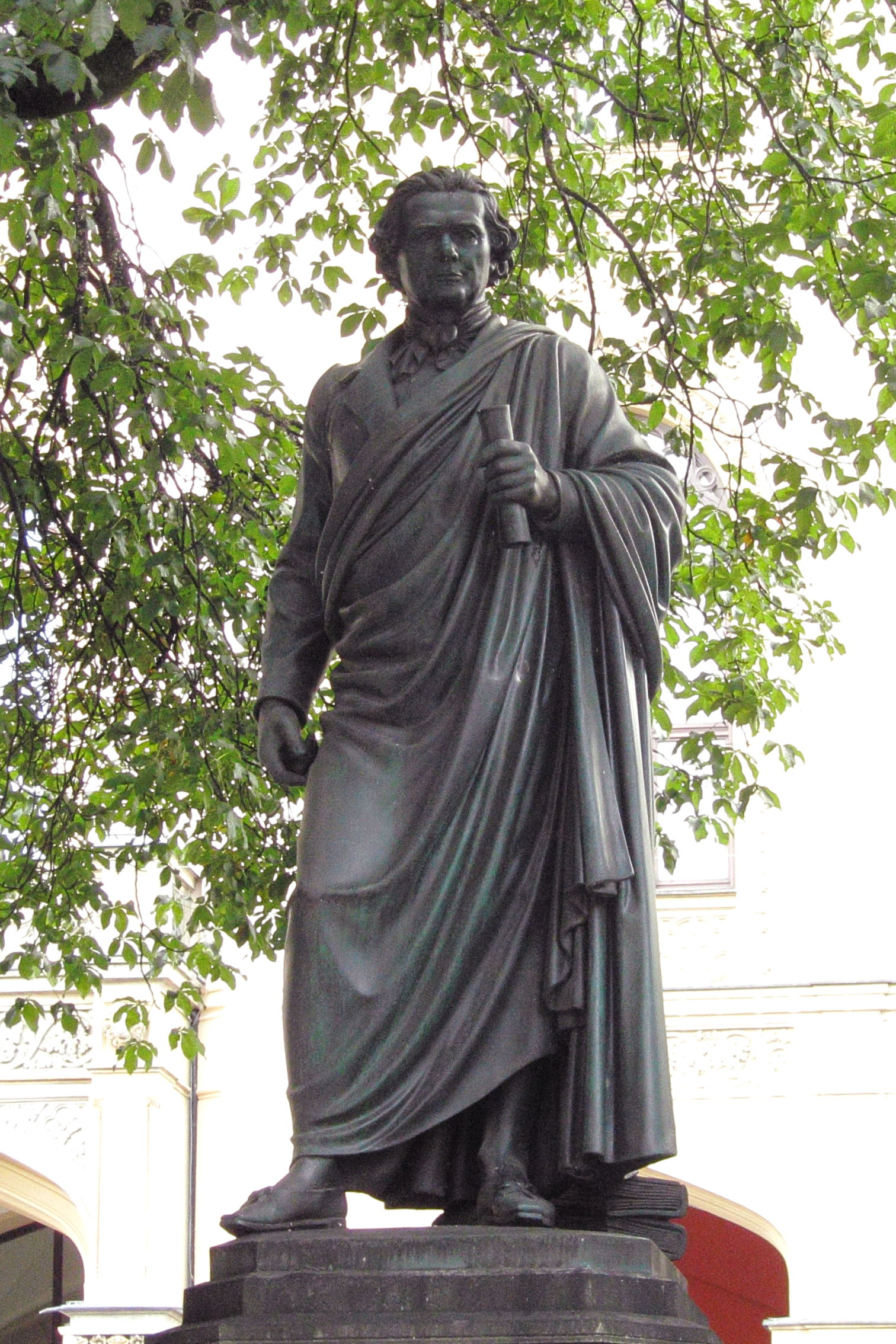 Friedrich Wilhelm von Schelling, von Friedrich Brugger, 1861.